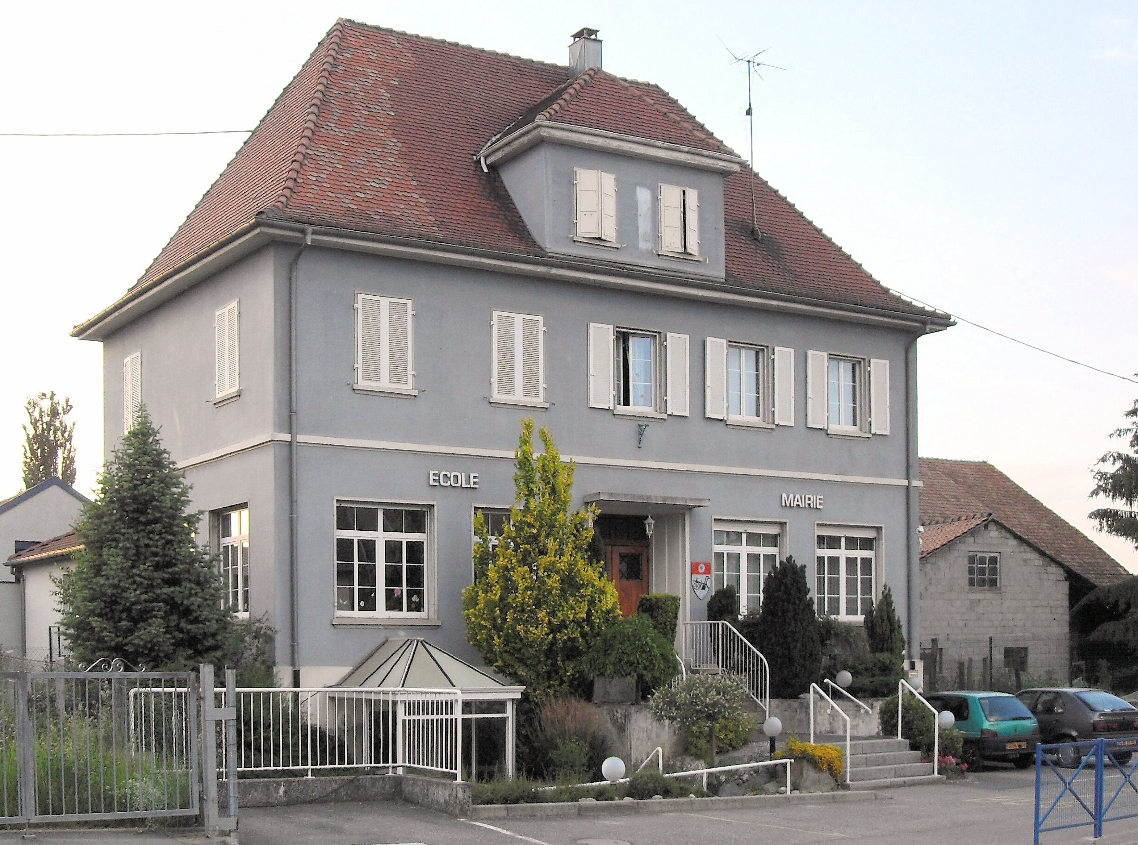 La mairie-école de Gommersdorf